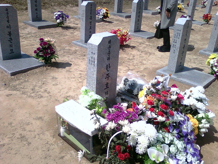 대전국립현충원에 안장된 한주호 준위